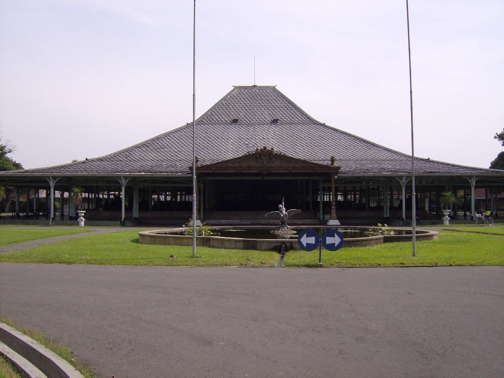 see title